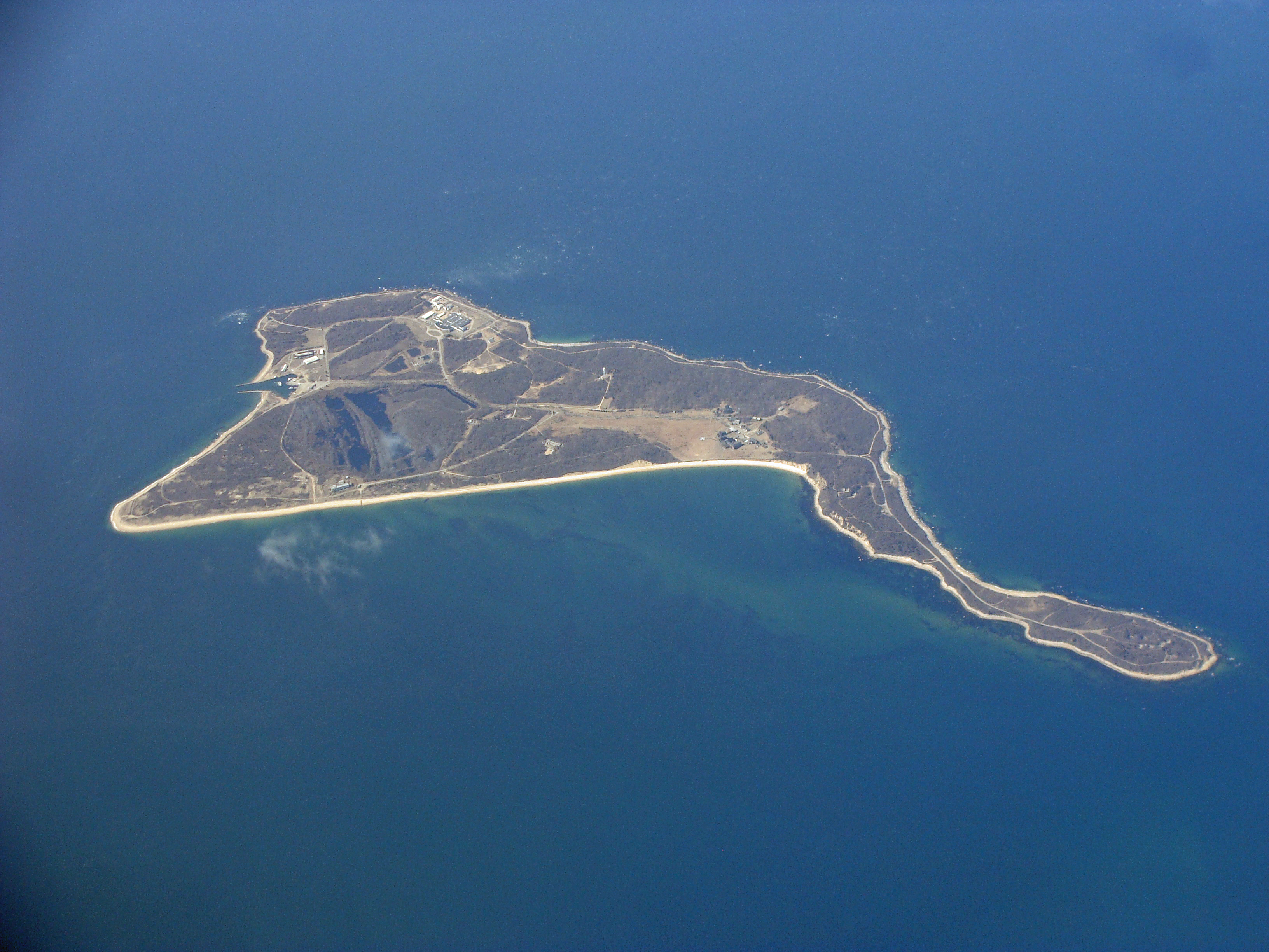 Vereinigte Staaten: Plum Island vor Long Island im Staat New York